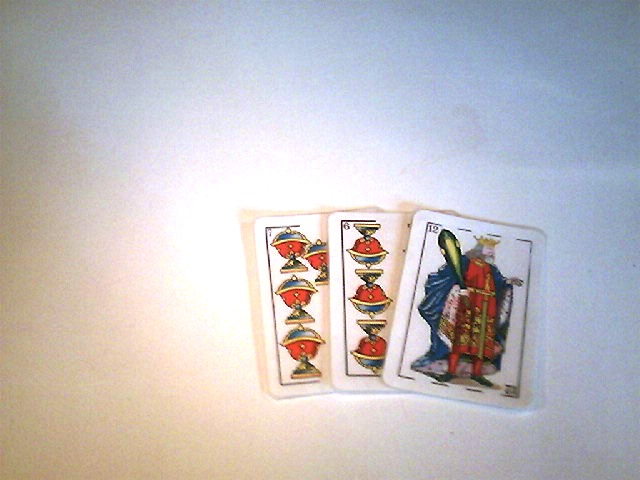 Una mano de truco: un envido de 33 puntos, el más alto posible.